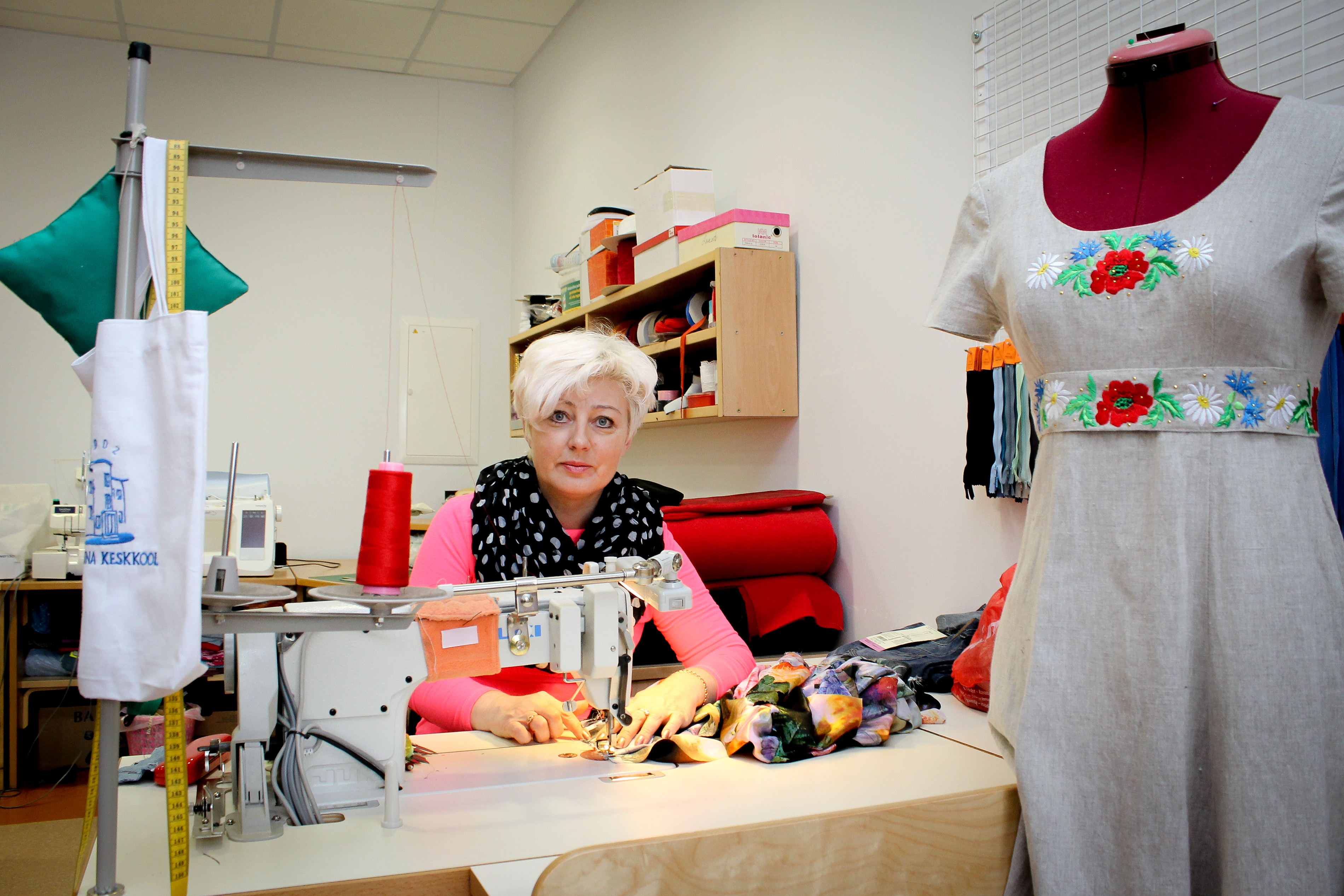 Kadrina õmblusateljee